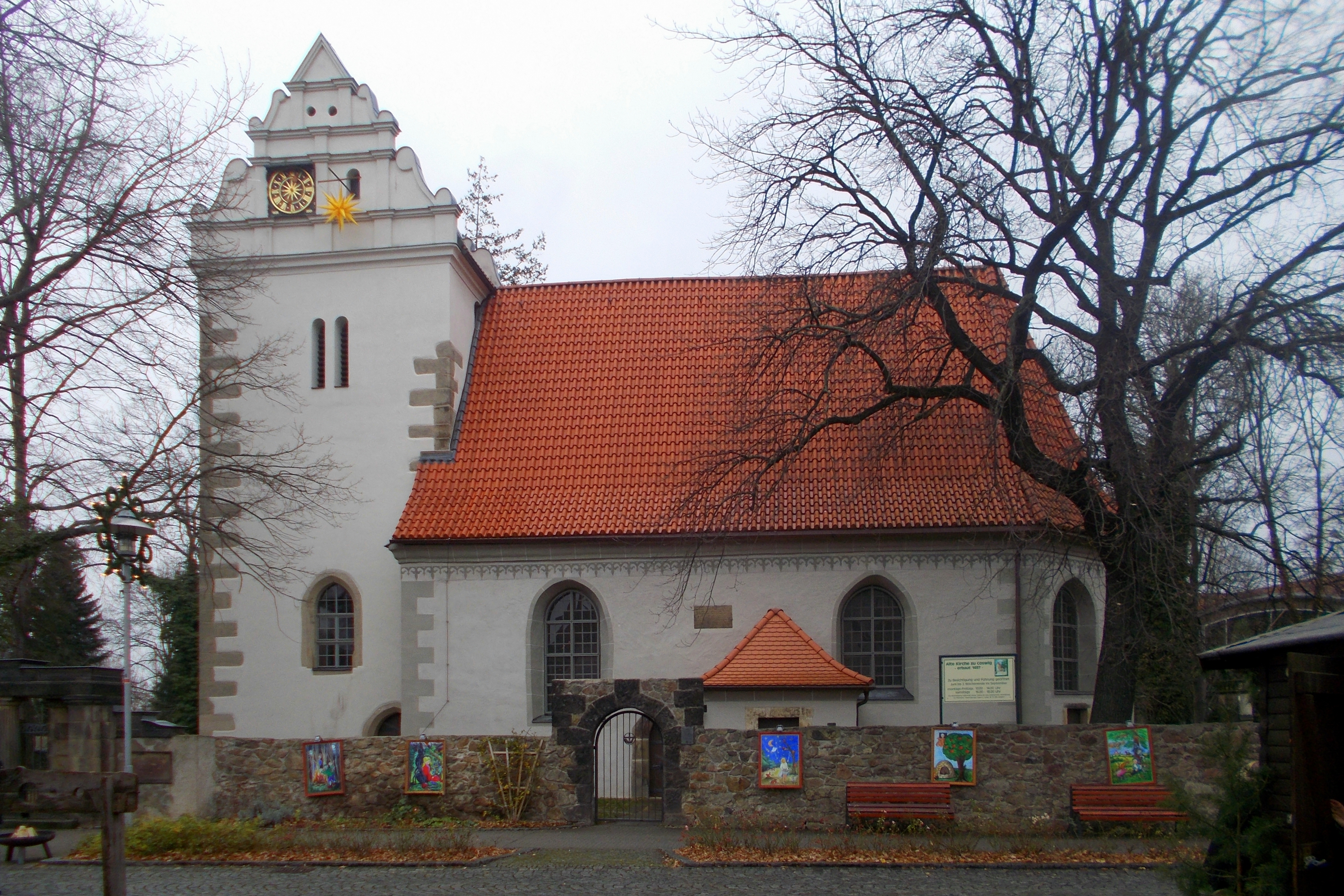 2017 Coswig Alte Kirche